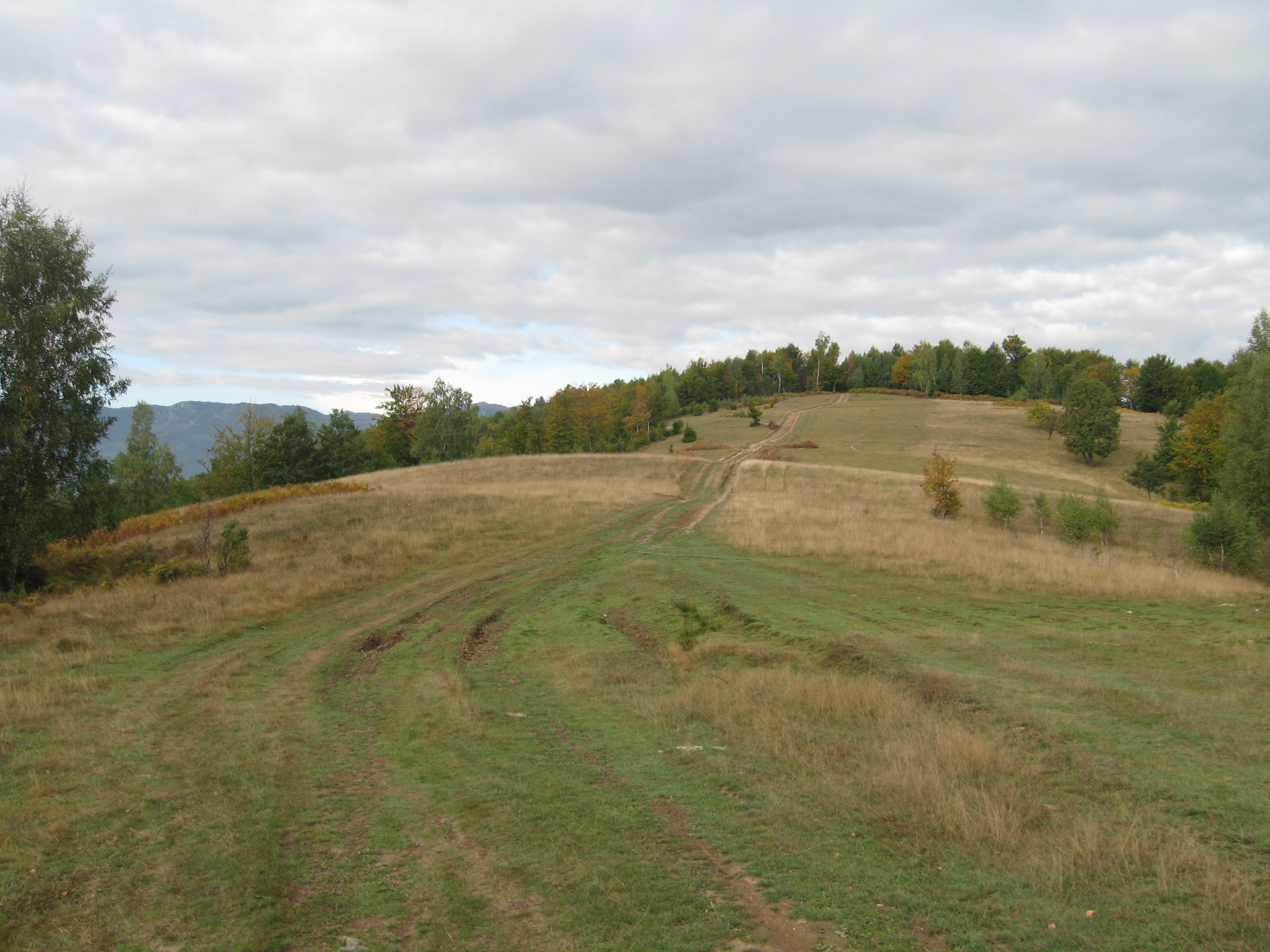 Bojna njiva